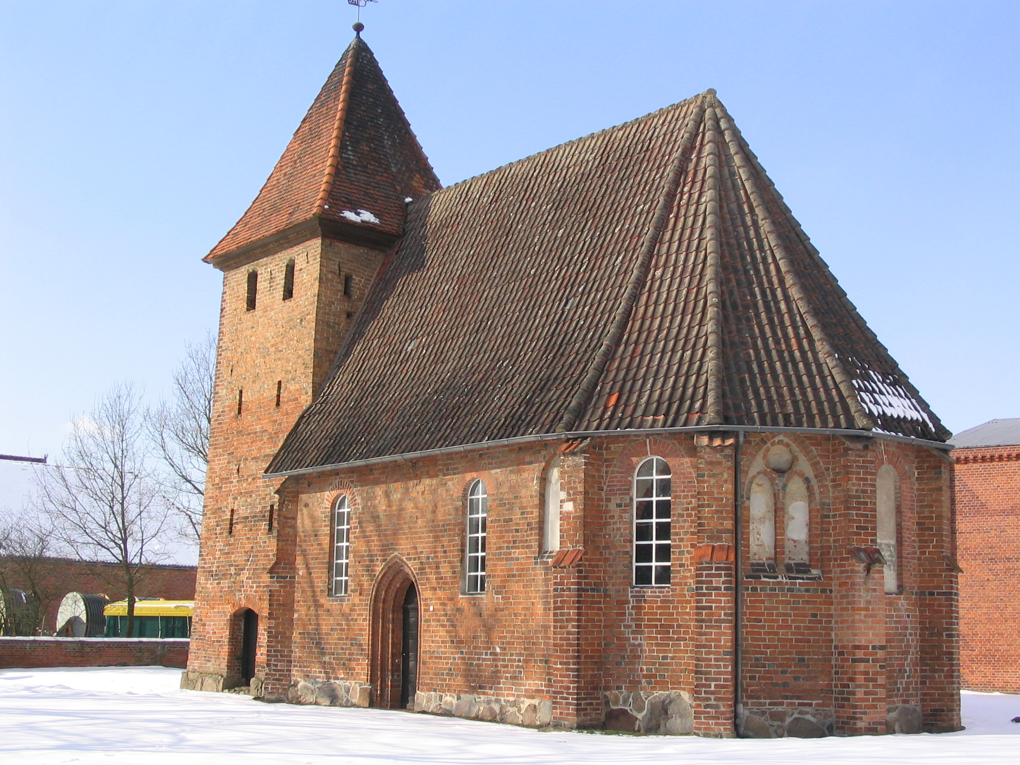 St.-Georgs-Kapelle Groß Liedern (Außensansicht)